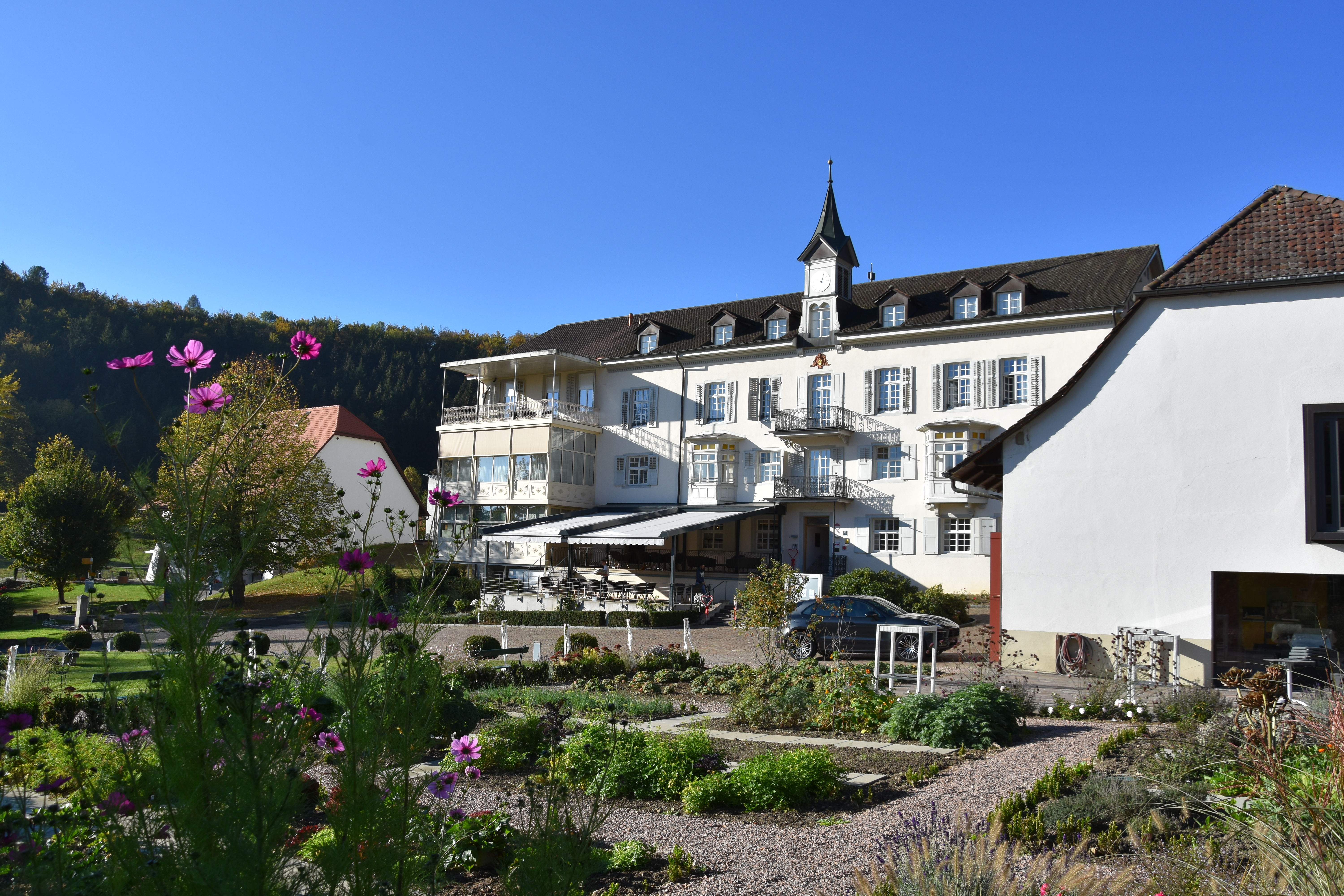 Bad Schauenburg mit Garten von Osten - Okt. 2018